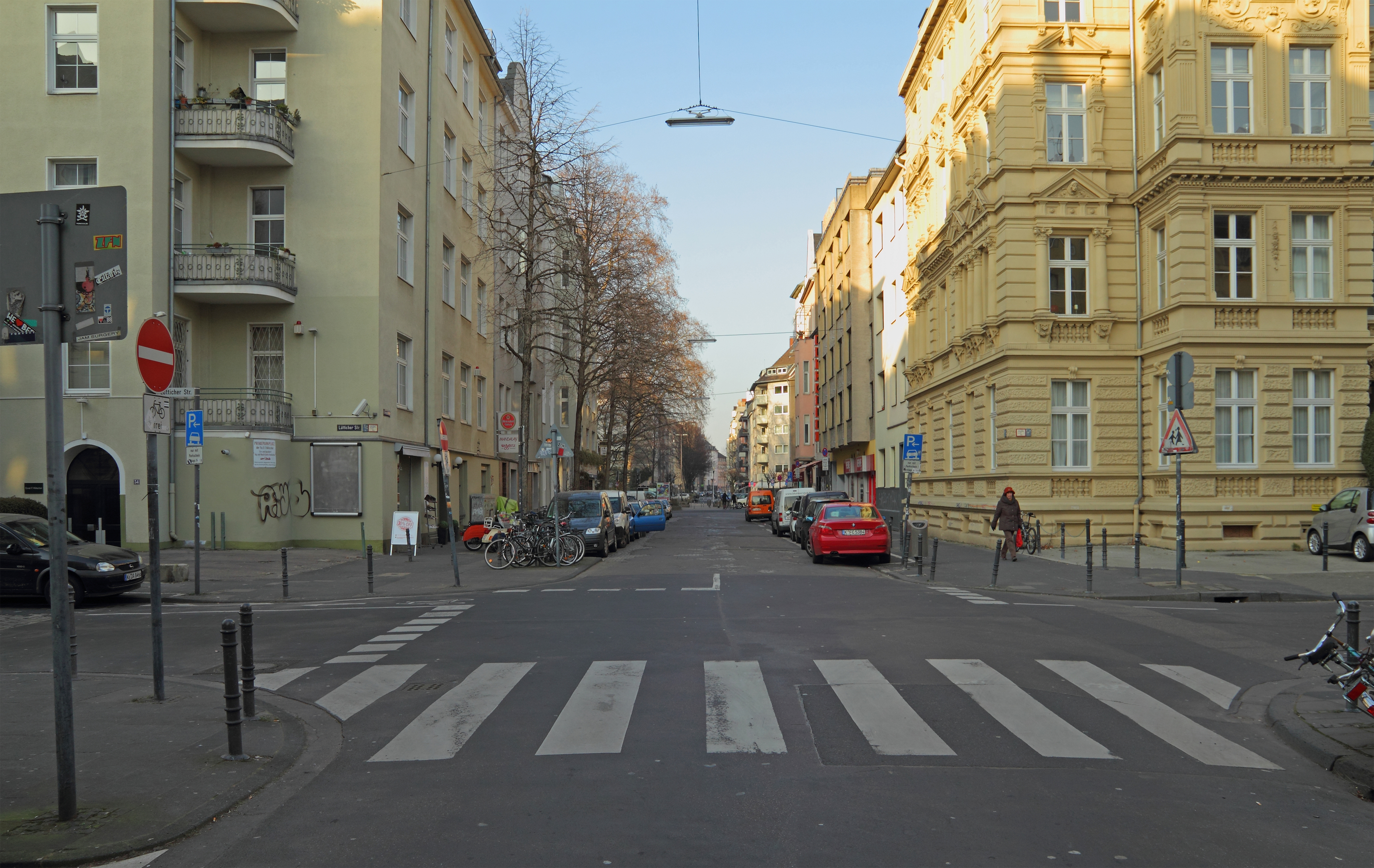 Brüsseler Straße / Ecke Lütticher Straße. Köln, Belgisches Viertel.